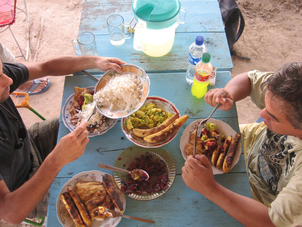 Representación de personas consumiendo platos típicos de la selva peruana.